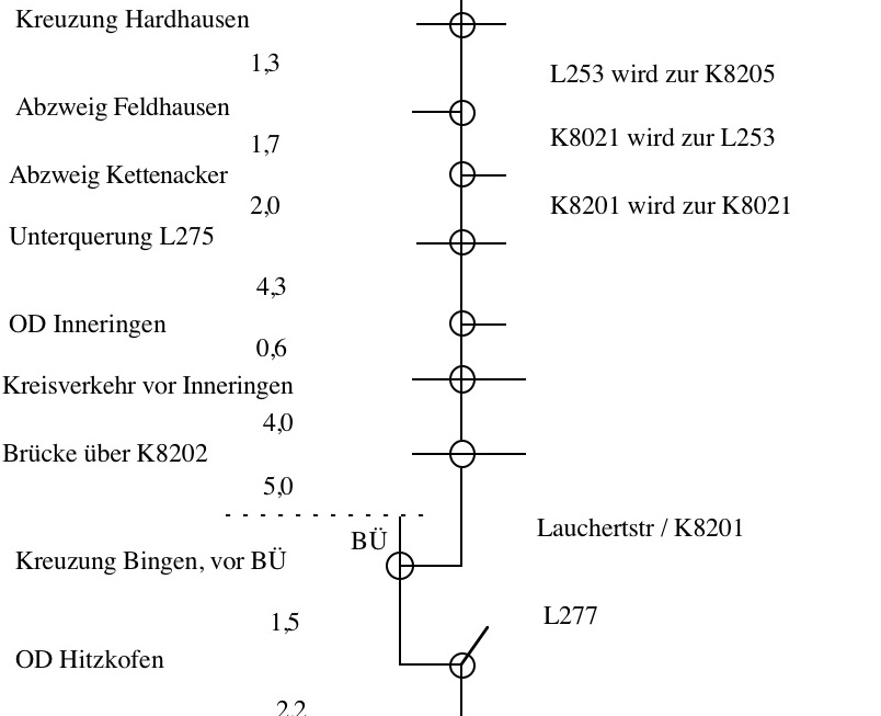 Beispiel für eine Marschskizze für den Kraftfahrzeugmarsch im Katastrophenschutz